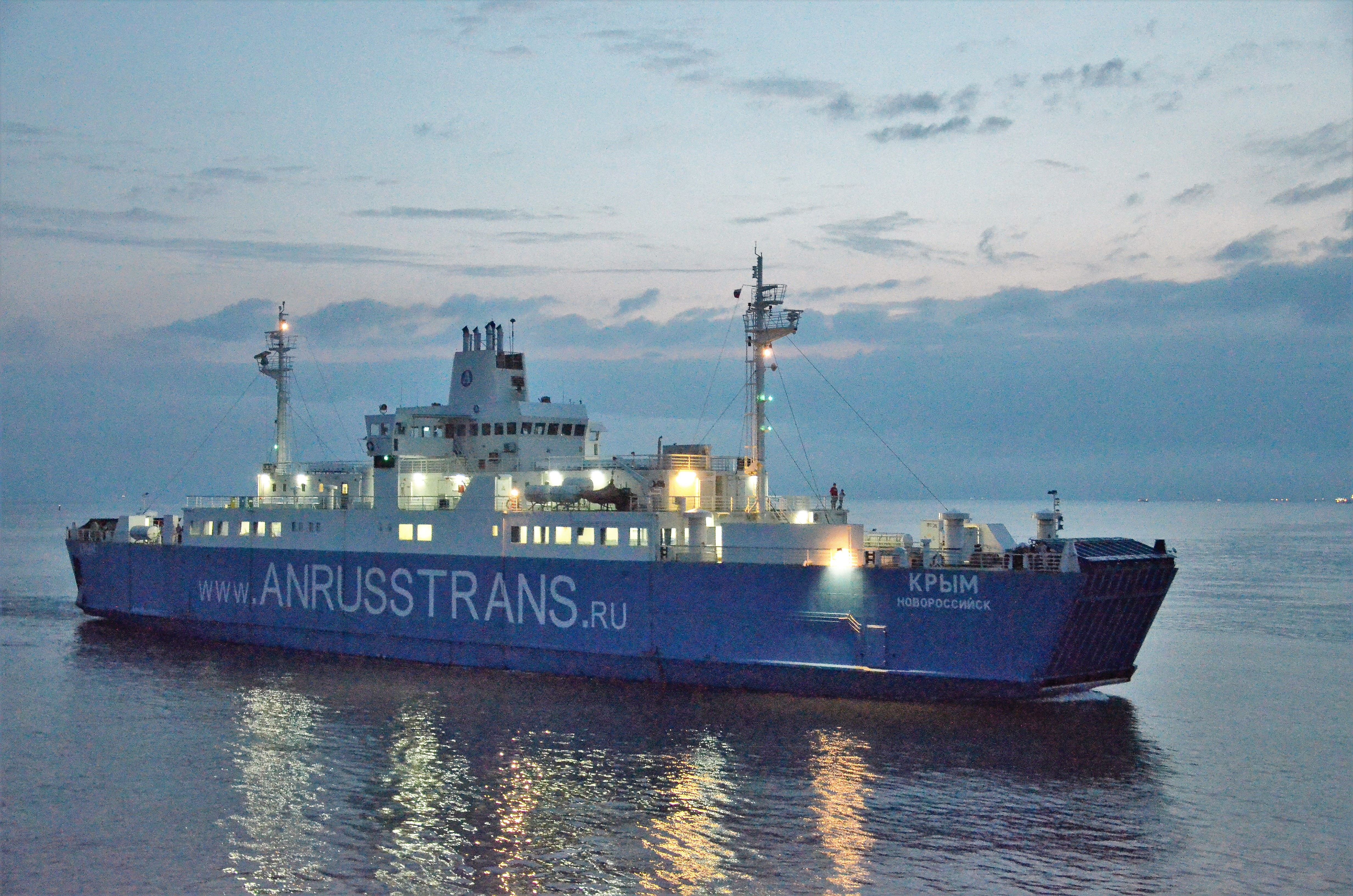 Керченская паромная переправа